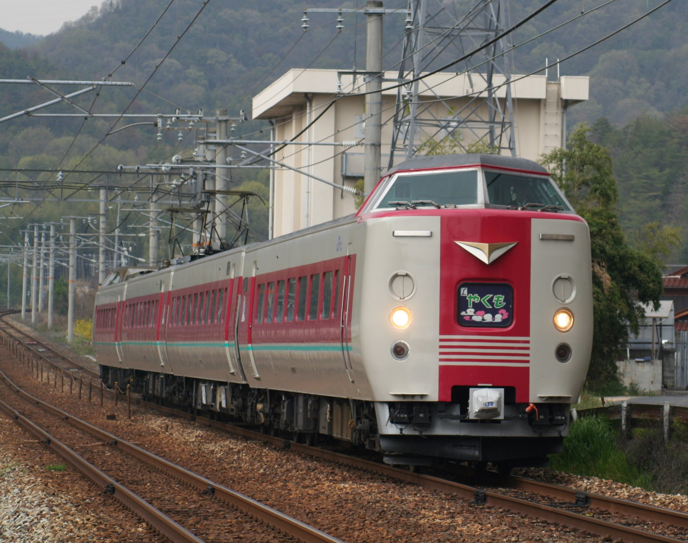 JR西日本381系特急やくもの非貫通型。ゆったりやくも塗色。岡山県総社市井尻野、伯備線、豪渓～総社間。